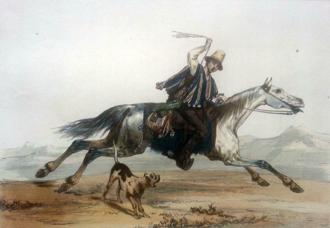 Un Huaso de Chile en 1846. Por Alcide d'Orbigny en Voyage dans l'Amérique Méridionale :le Brésil, le Republique Orientale de l'Uruguay, le Republique Argentine ... /Paris : [s.n.], 1835-1839.